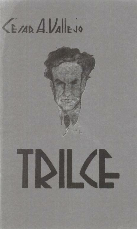 Cubierta de la primera edición del poemario Trilce (1922)